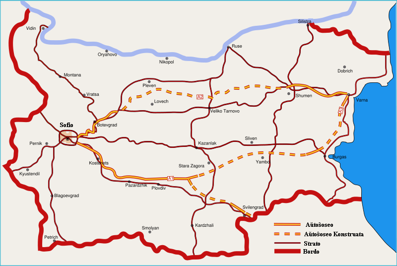 La bulgara stratreto Fonto : :en:Image:Bulgarian motorway network en.svg